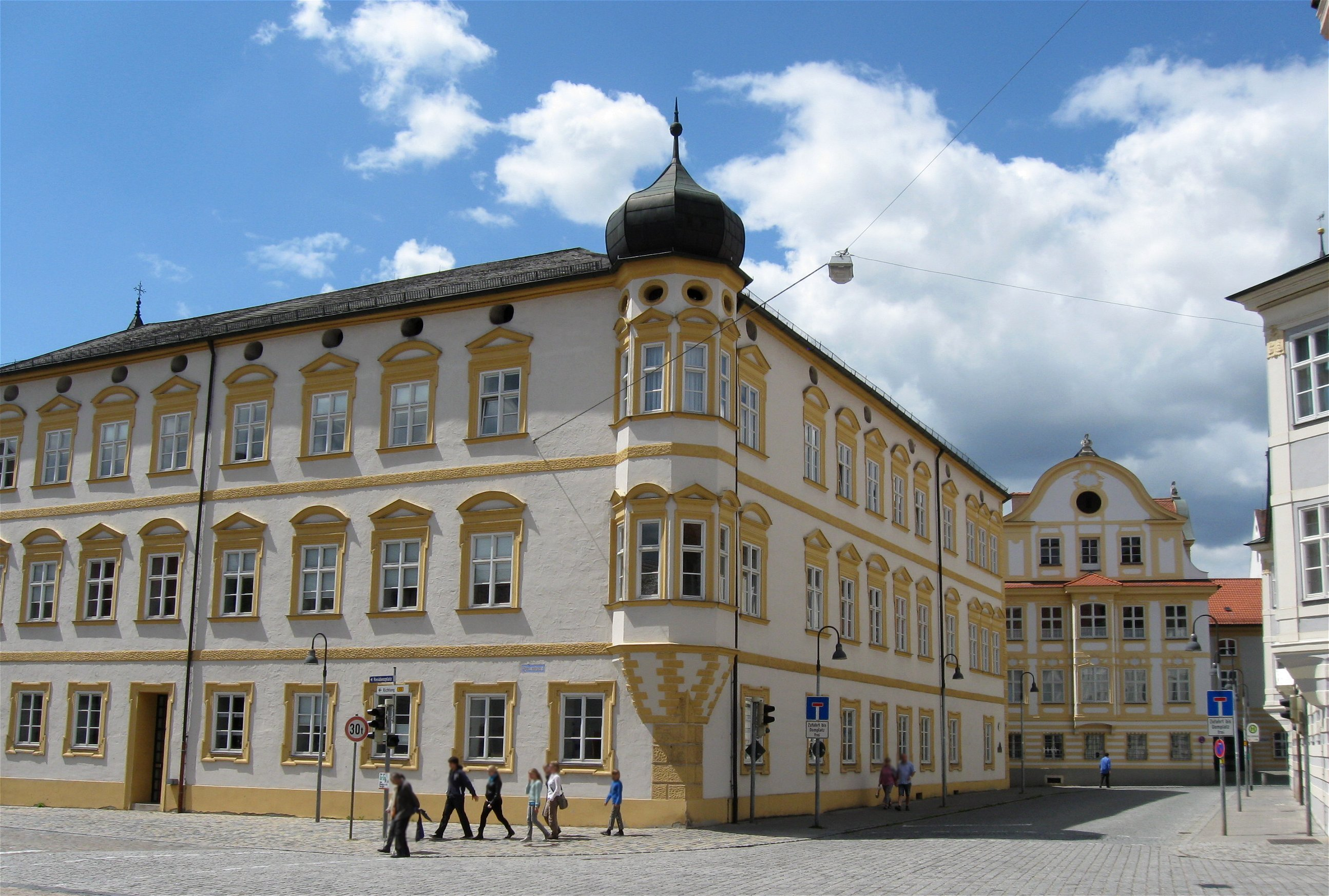 Pater-Philipp-Jeningen-Platz 6; Ehemaliger Domherrenhof Ulm, jetzt Teil der Gesamthochschule Eichstätt, dreigeschossige Vierflügelanlage mit Eckerkerturm, um 1625 erbaut, Ausgestaltung zum barocken Palais durch Giovanni Giacomo Engl 1688, Hofeinfahrt bezeichnet mit dem Jahr 1578, Umbau 1978-80 durch Karljosef Schattner zur Fachbereichs- Bibliothek Theologie der Katholische Universität. D-1-76-123-178